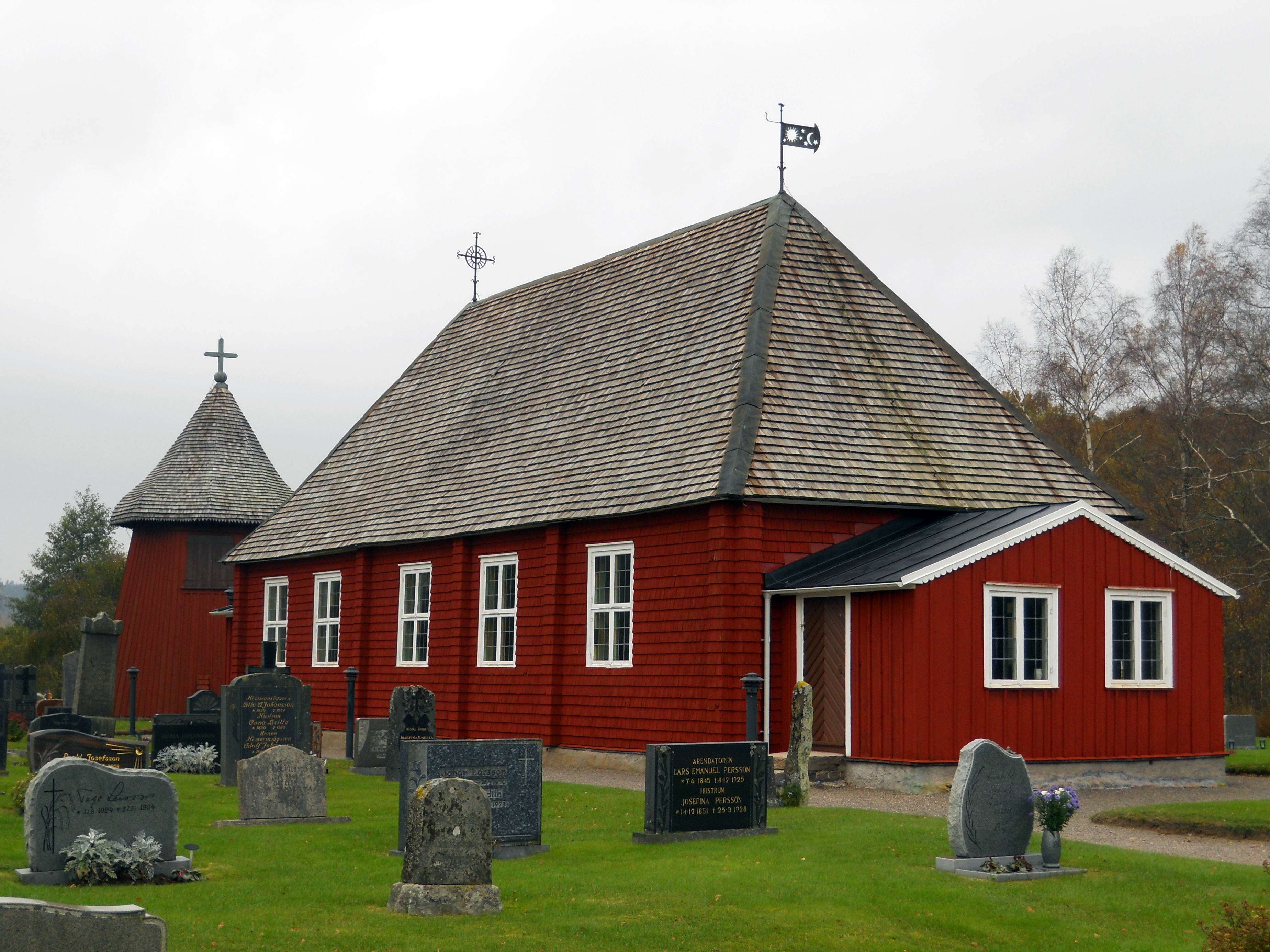 Nösslinge kyrka, Varbergs kommun.